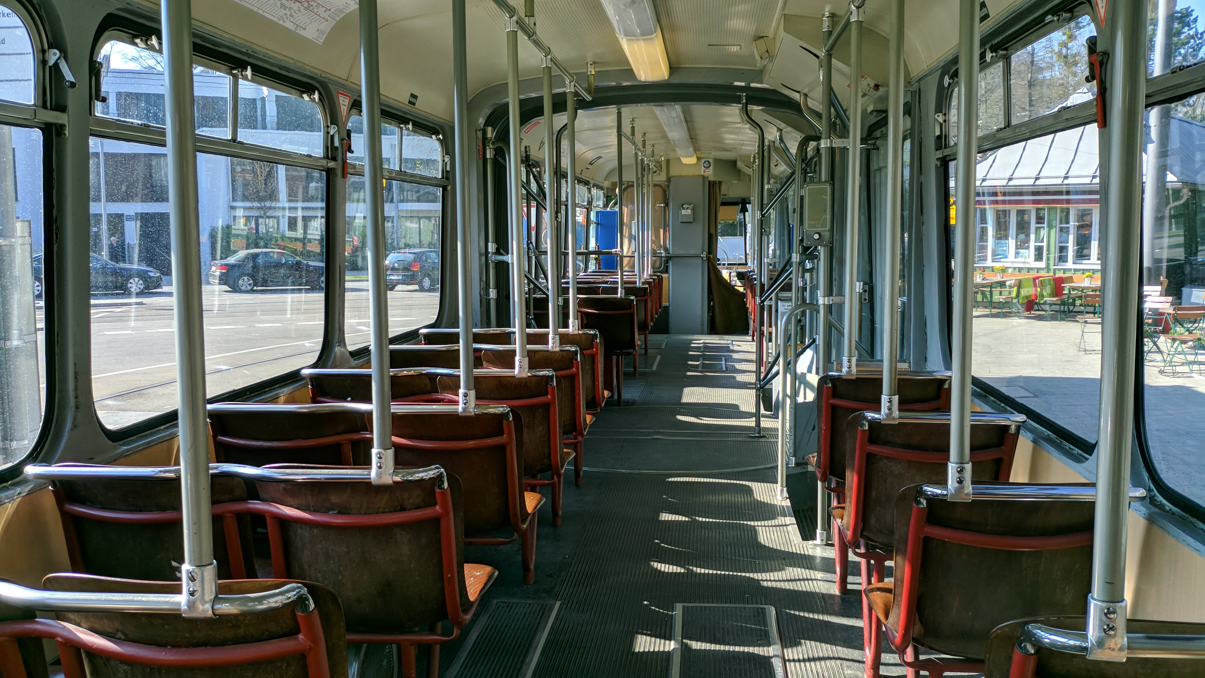 Innenraum des P-Wagens 2006 der MVG, fotografiert in der Wendeschleife an der Großhesseloher Brücke.